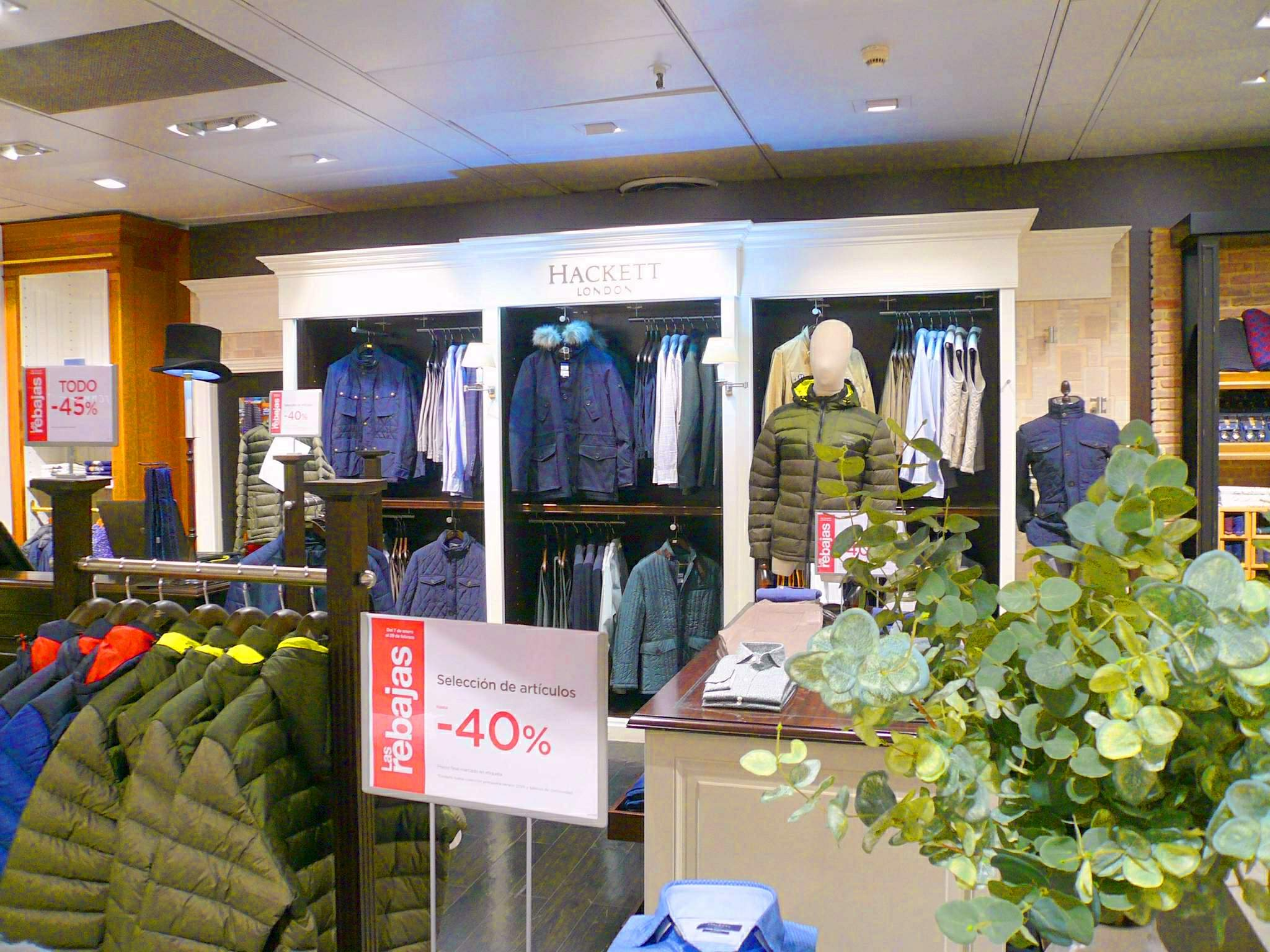 Tienda de Hackett London en el Corte Inglés de Vitoria